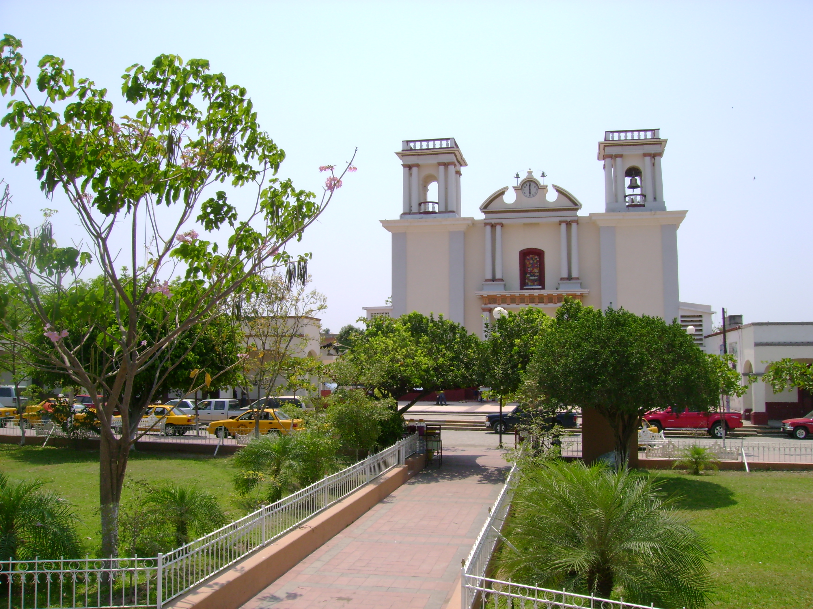 Centro de Coquimatlan, Colima